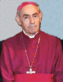 Mons. Marco Virgilio Ferrari, vescovo titolare di Mazaca e vescovo ausiliare di Milano, in visita al Santuario di Corbetta nel 2010